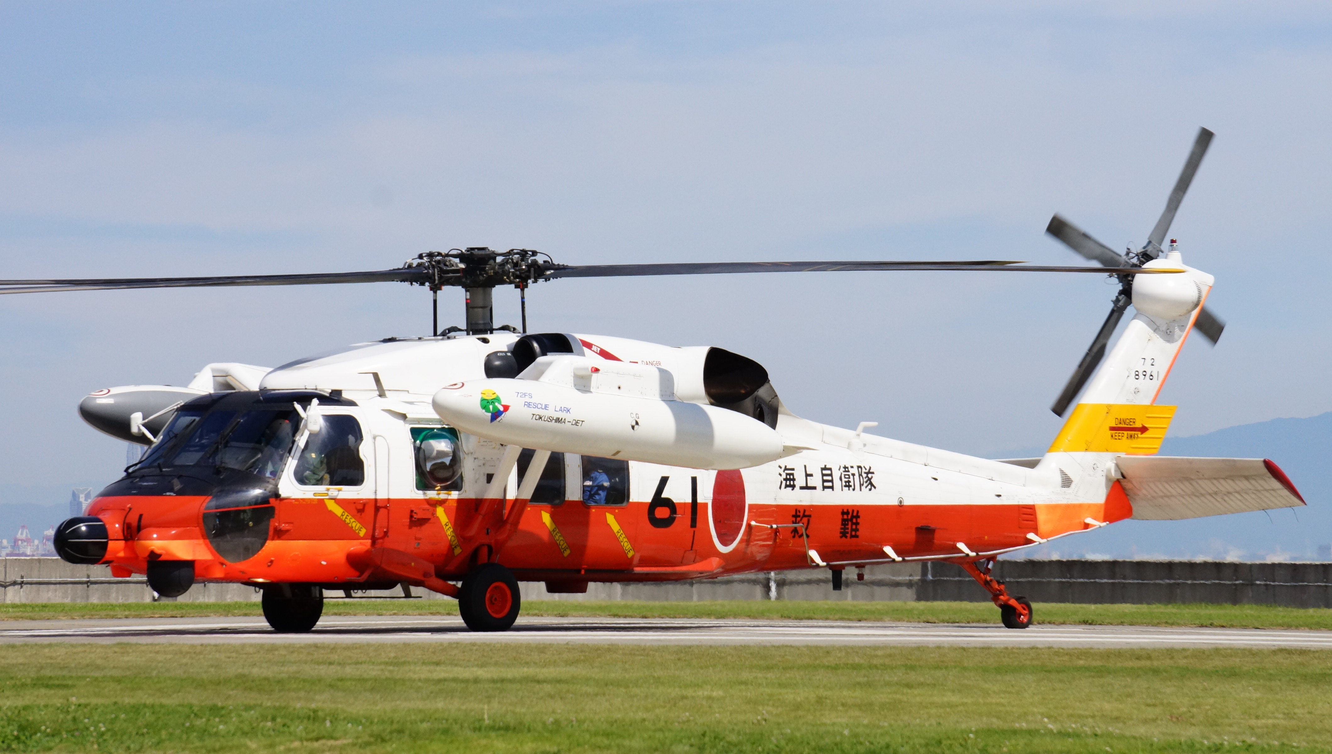 海上自衛隊 UH-60Jヘリコプター（8961号機）。13年7月20日 阪神基地にて。